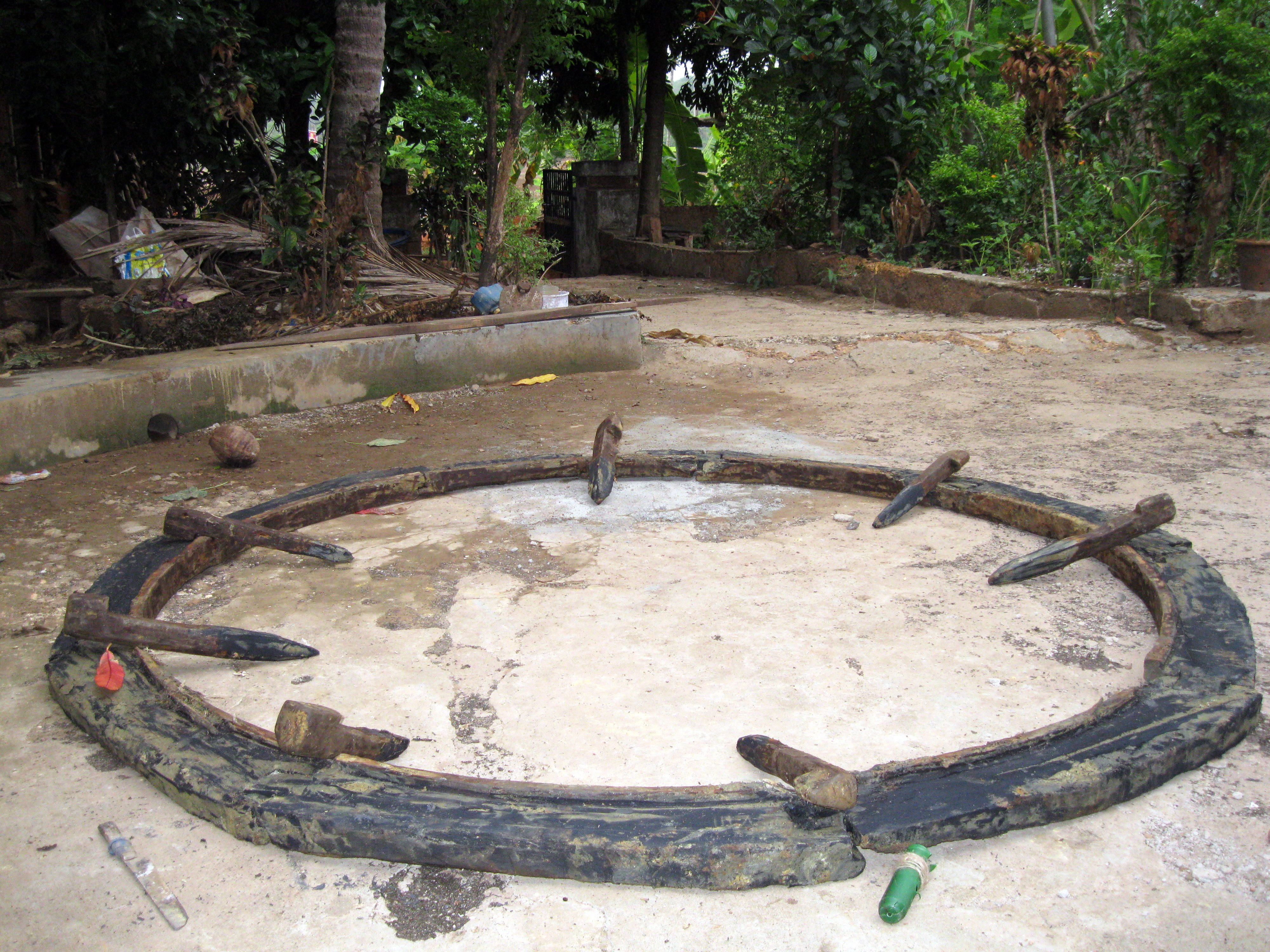 കിണറുകളുടെ ഏറ്റവും അടിയിൽ സ്ഥാപിക്കുന്ന നെല്ലിമരത്തടികൊണ്ടുണ്ടാക്കിയ പടവ്, ബ്ലാത്തൂർ ശ്രീസദനത്തിലെ കിണറിൽ നിന്നും പുറത്തെടുത്തത്